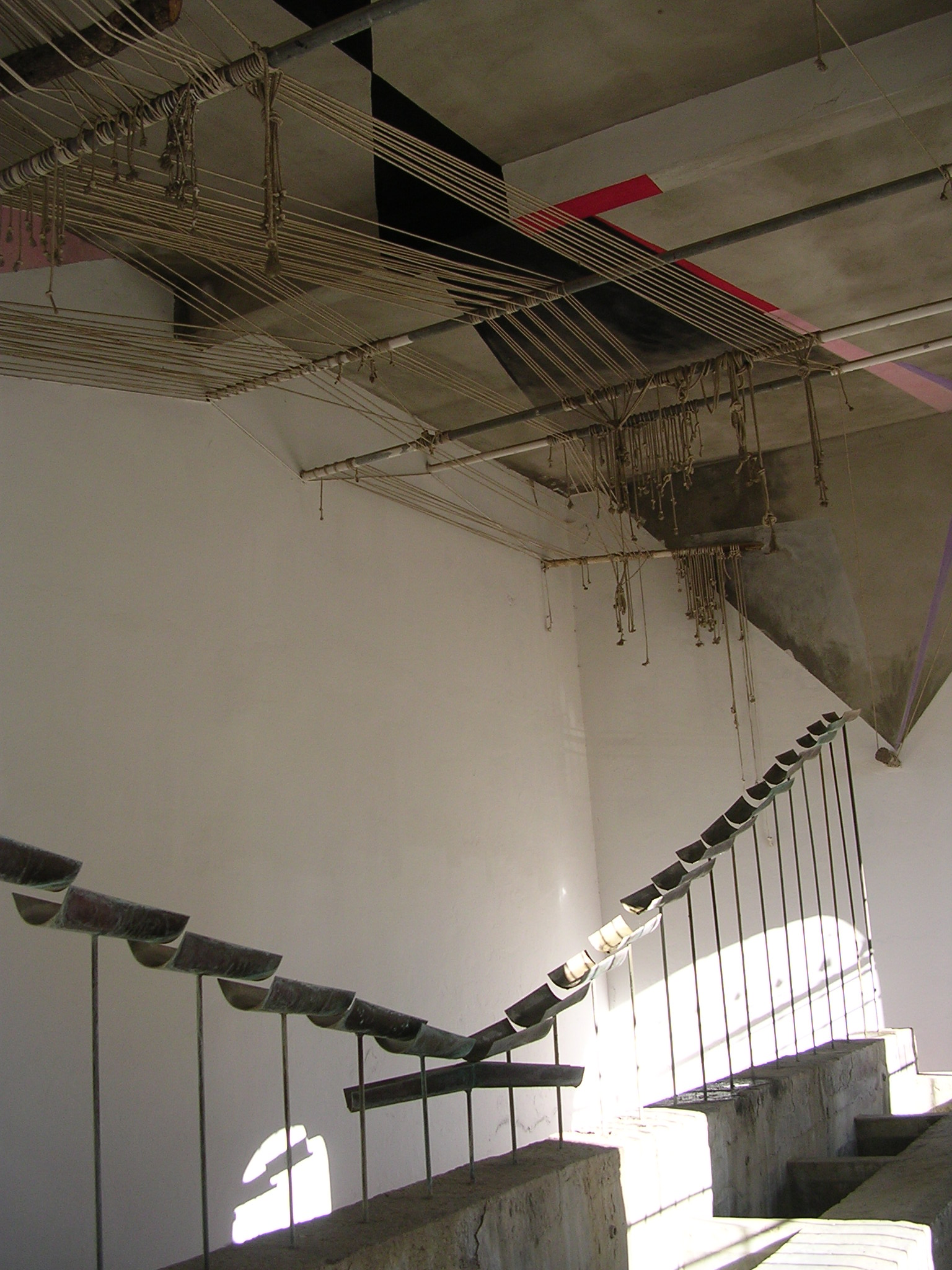 Interni del Lavatoio di Ulassai